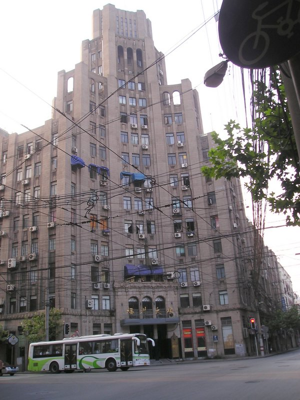 中文（中国大陆）: 汉弥尔登大楼